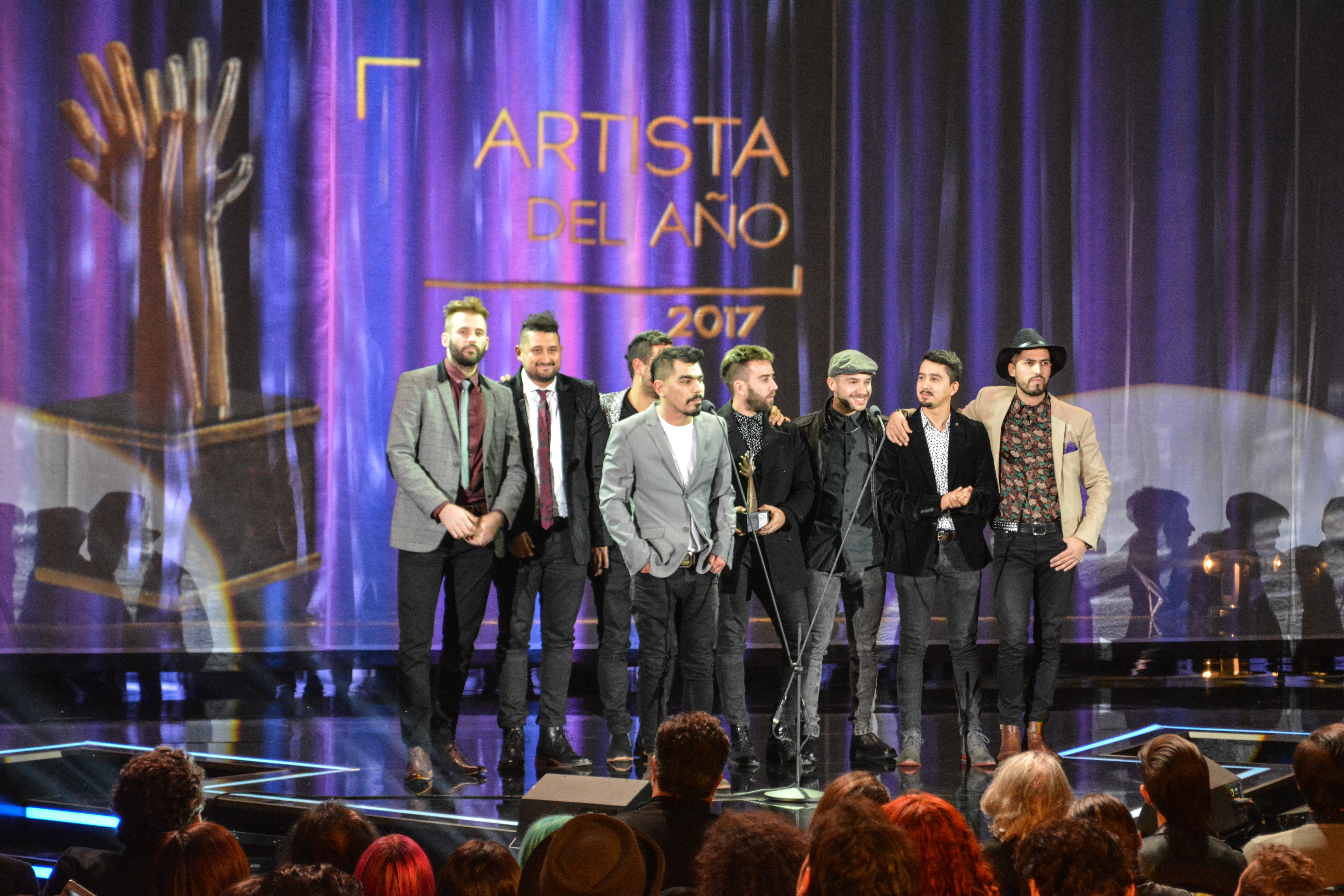 Premios Pulsar 2017